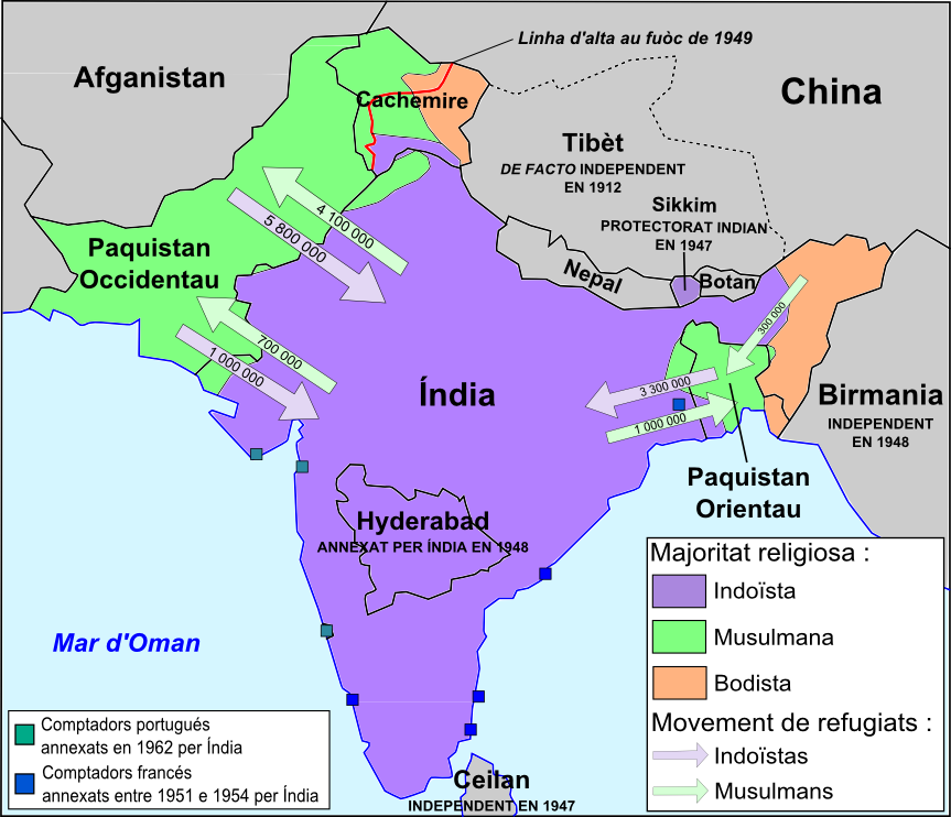 Partiment de la peninsula indiana en 1947.